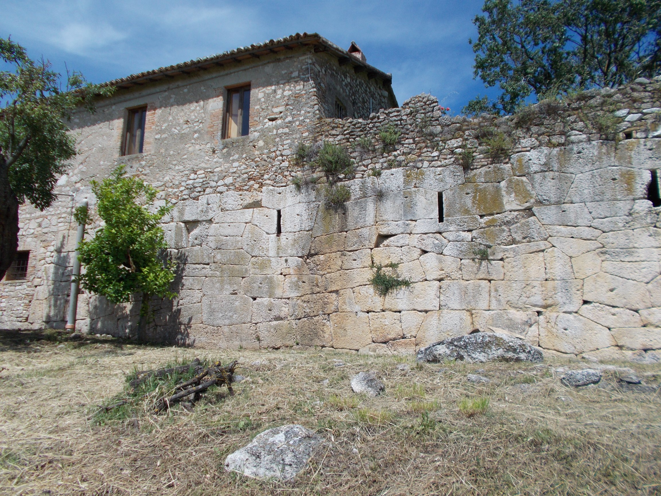 Le mura ciclopiche di Grotte di Torri, sulle quali nell'Ottocento è stato elevato un casale